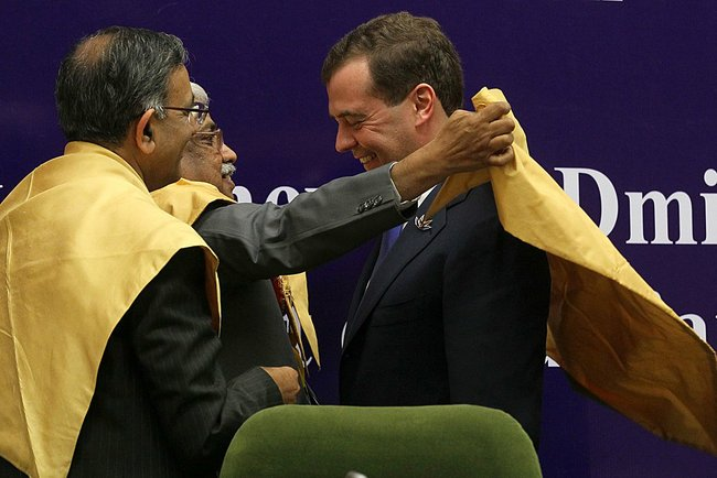 Дмитрию Медведеву вручён диплом почётного доктора Университета имени Джавахарлала Неру.